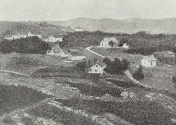 Søre Haugland på Askøy 1915